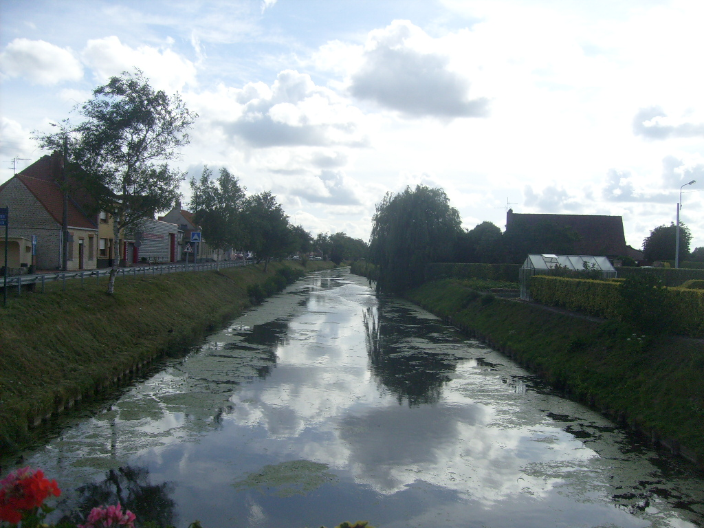 Canal de la Basse Colme (Canal de Bergues en Belgique: Bergenvaart) sortant de Bergues au niveau de Hoymille.